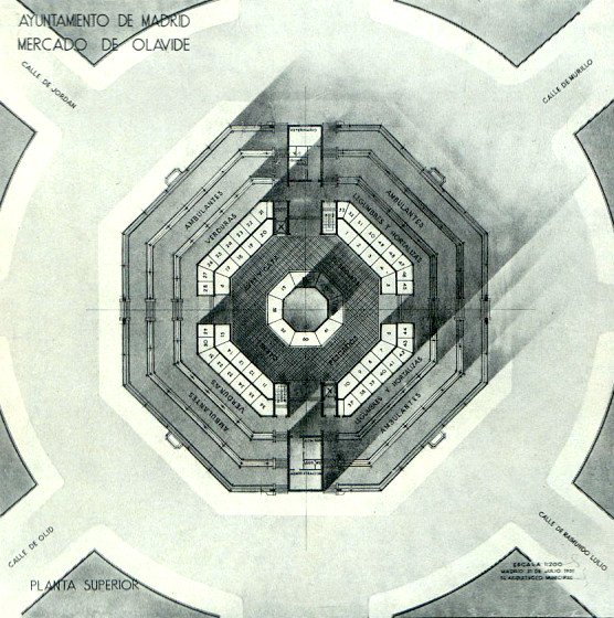 Mercado de Olavide. Planta superior